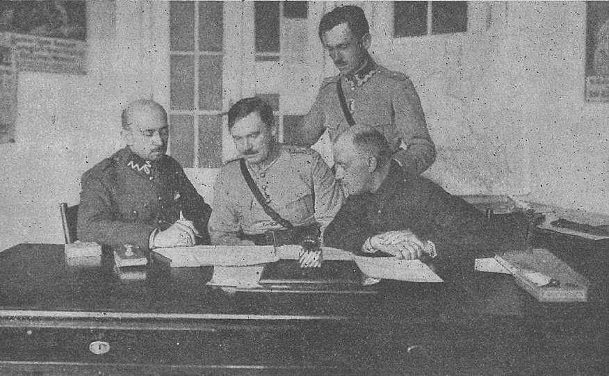 Współpracownicy Wydziału Propagandy przy Armii Ochotniczej w 1920: Kornel Makuszyński, ppłk Marian Dienstl-Dąbrowa (szef), por. Miszke, Włodzimierz Perzyński.